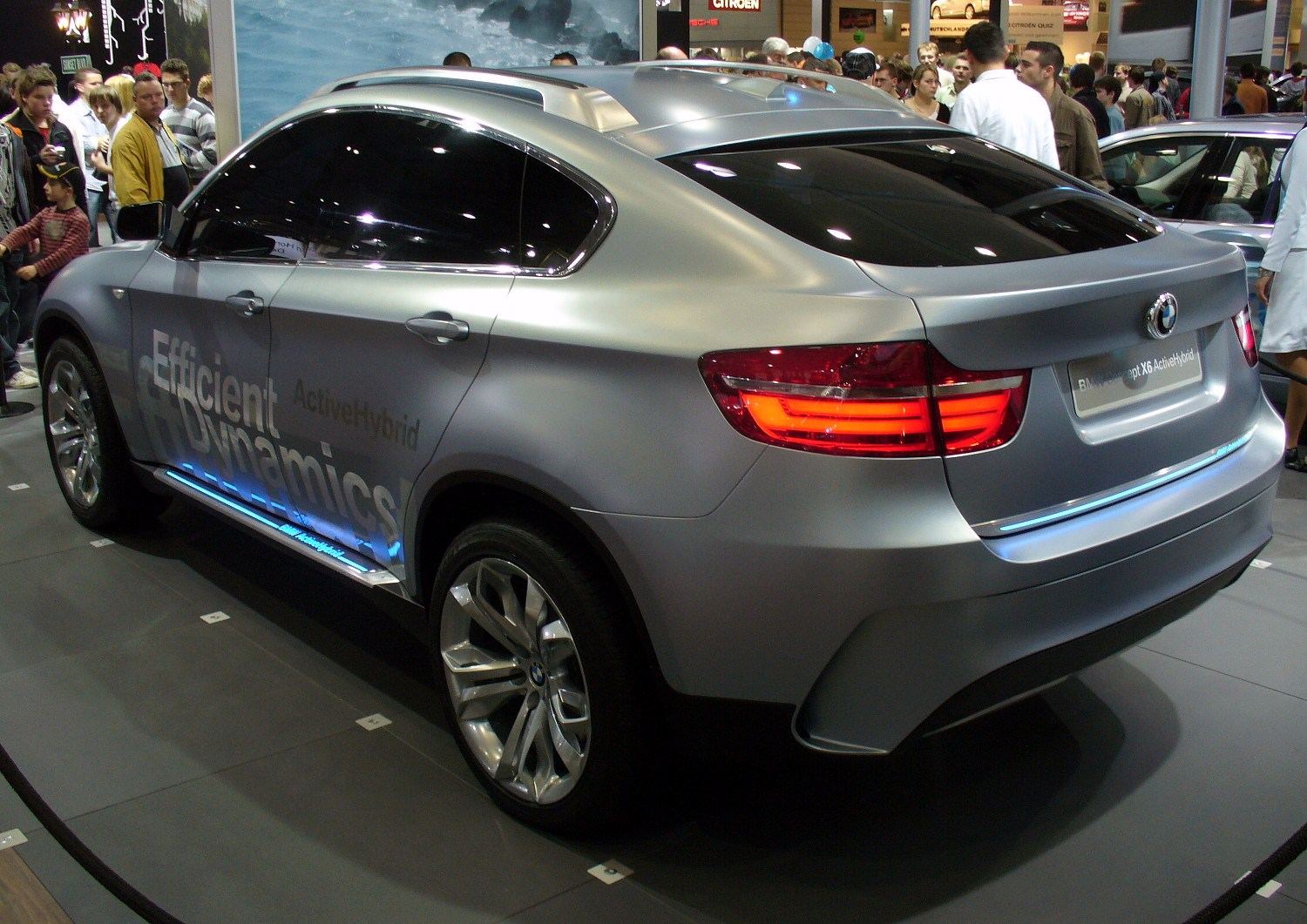 BMW Concept X6 Active Hybrid